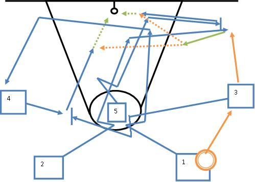 Zagrywka koszykarska (teoria)